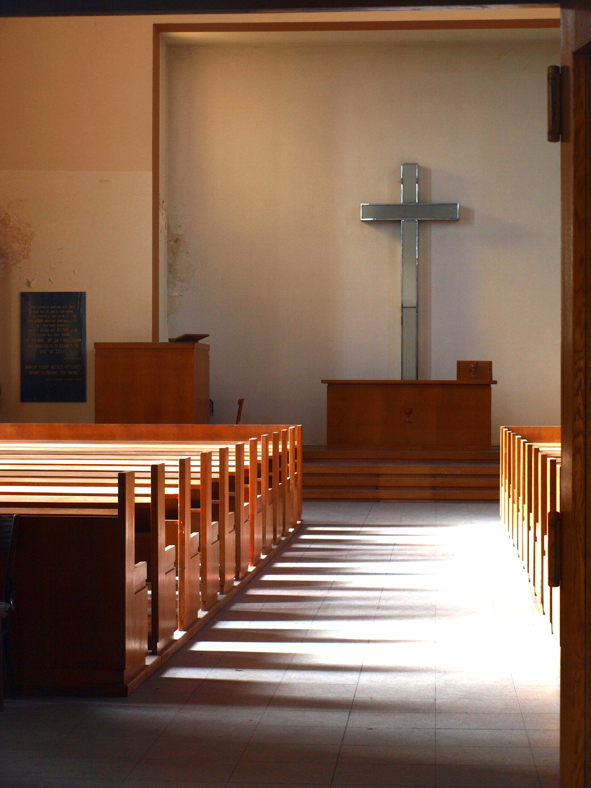 Husův sbor, Praha-Smíchov (Santoška)